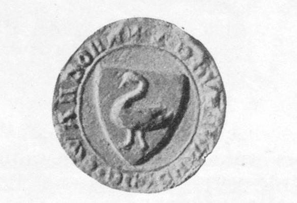 Burkard V. Joh. Komthur zu Buchsee etc. 1303 III 23 (StA Solothurn, Stift)